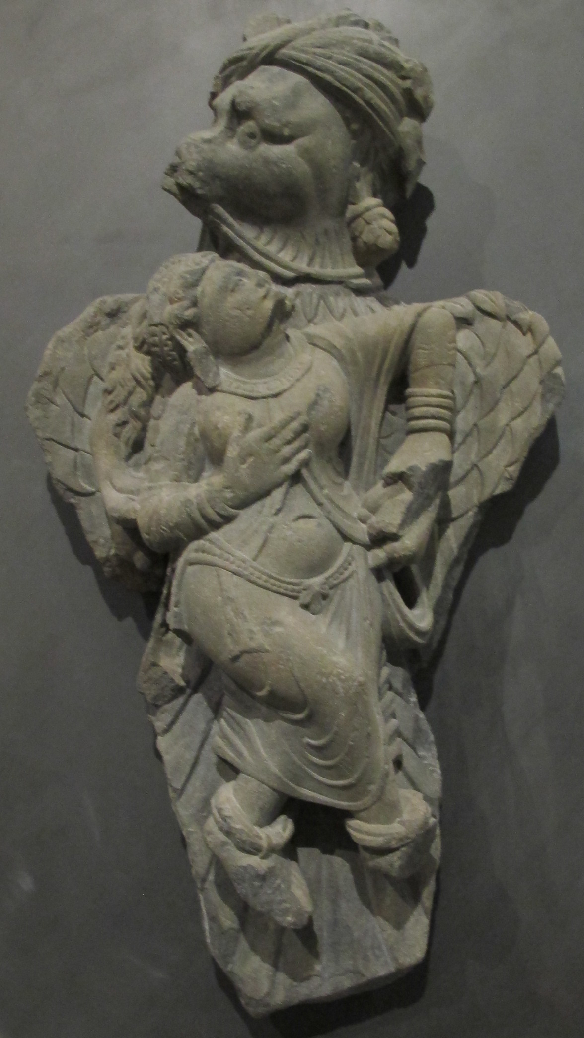 Gandhara, garuda adduce la regina kakati, periodo kushan 200-400